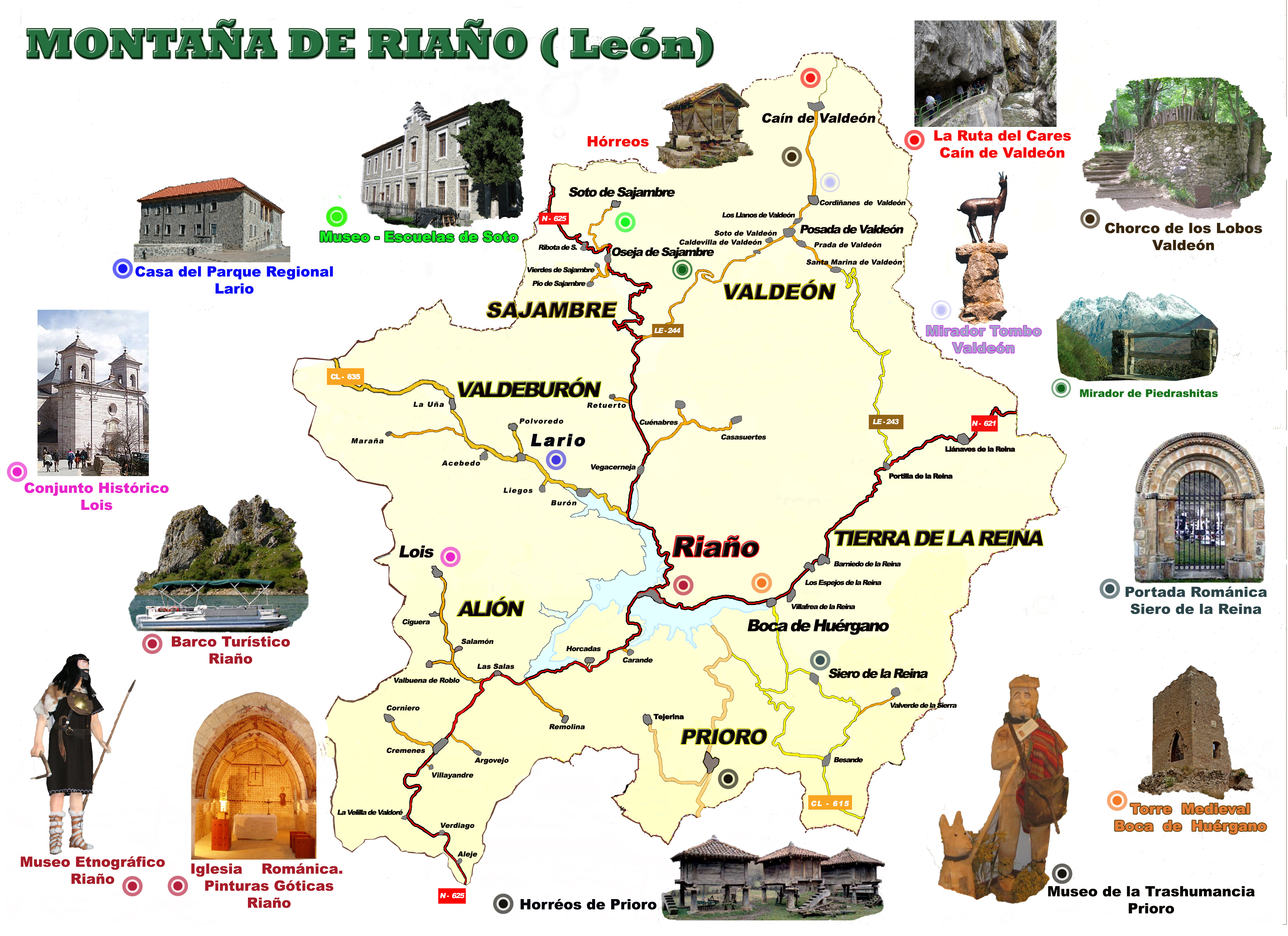 Mapa de la Comarca